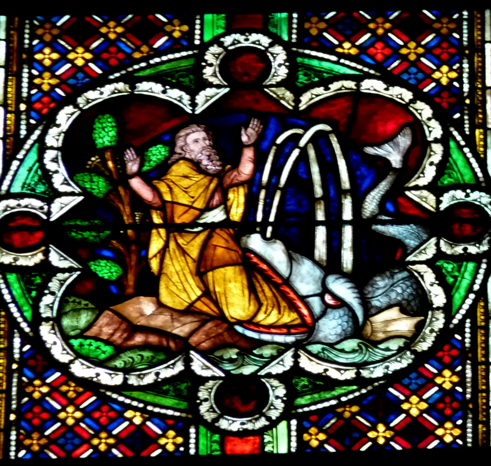 Scheibe aus dem "Jüngeren Bibelfenster" im Chor des Kölner Doms, Darstellung: Jona wird vom Fisch an Land gespien, Entstehung 1891/92